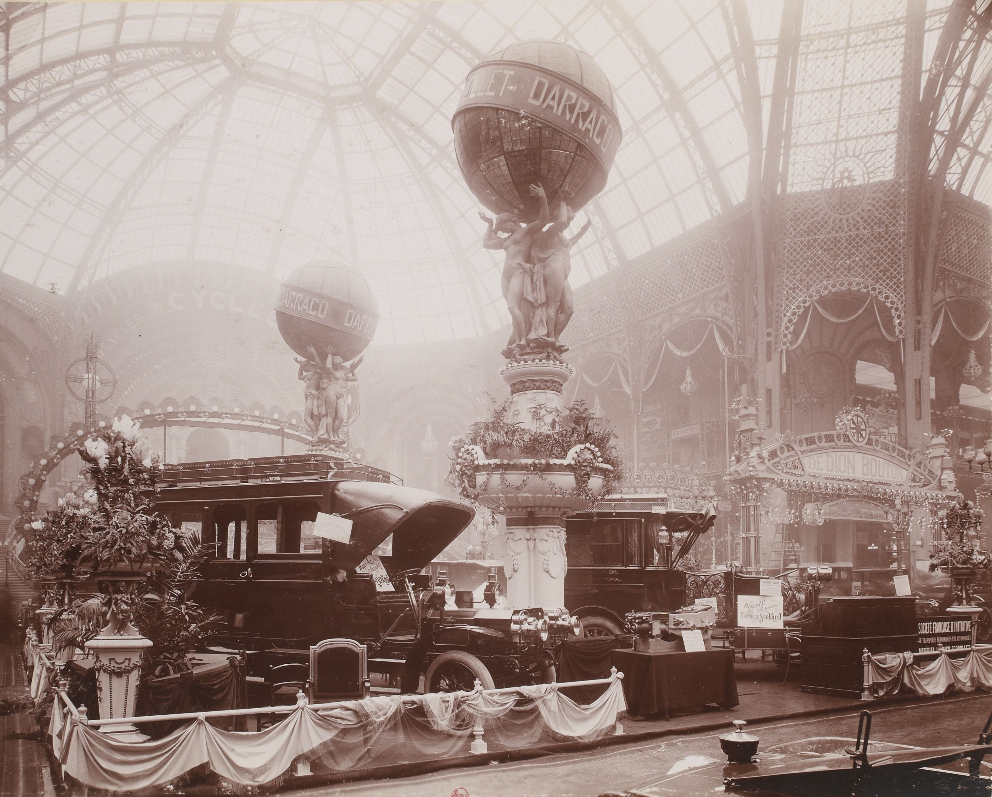 [Collection Jules Beau. Photographie sportive] : T. 33. Années 1906 et 1907 / Jules Beau : F. 18v. [Salon de l\'automobile au Grand-Palais. 7 au 23 décembre 1906]